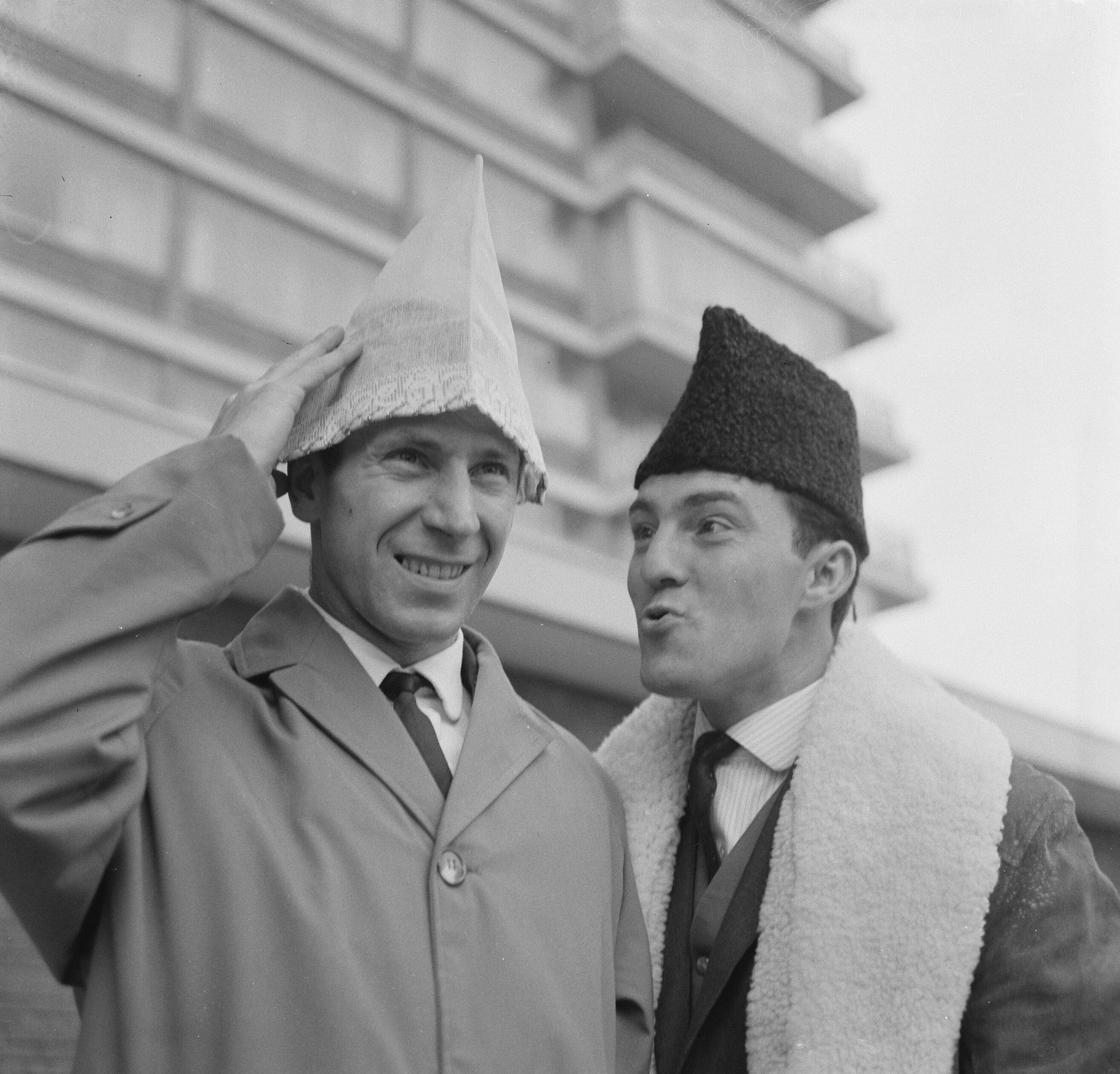 Collectie / Archief : Fotocollectie Anefo Reportage / Serie : [ onbekend ] Beschrijving : Bobby Charlton en rechts Jimmy Greaves voor het Hiltonhotel te Amsterdam (met mutsen op) Datum : 8 december 1964 Locatie : Amsterdam, Noord-Holland Trefwoorden : MUTSEN Persoonsnaam : Bobby Charlton, Jimmy Greaves Instellingsnaam : Hiltonhotel Fotograaf : Nijs, Jac. de / Anefo Auteursrechthebbende : Nationaal Archief Materiaalsoort : Negatief (zwart/wit) Nummer archiefinventaris : bekijk toegang 2.24.01.03 Bestanddeelnummer : 917-2183